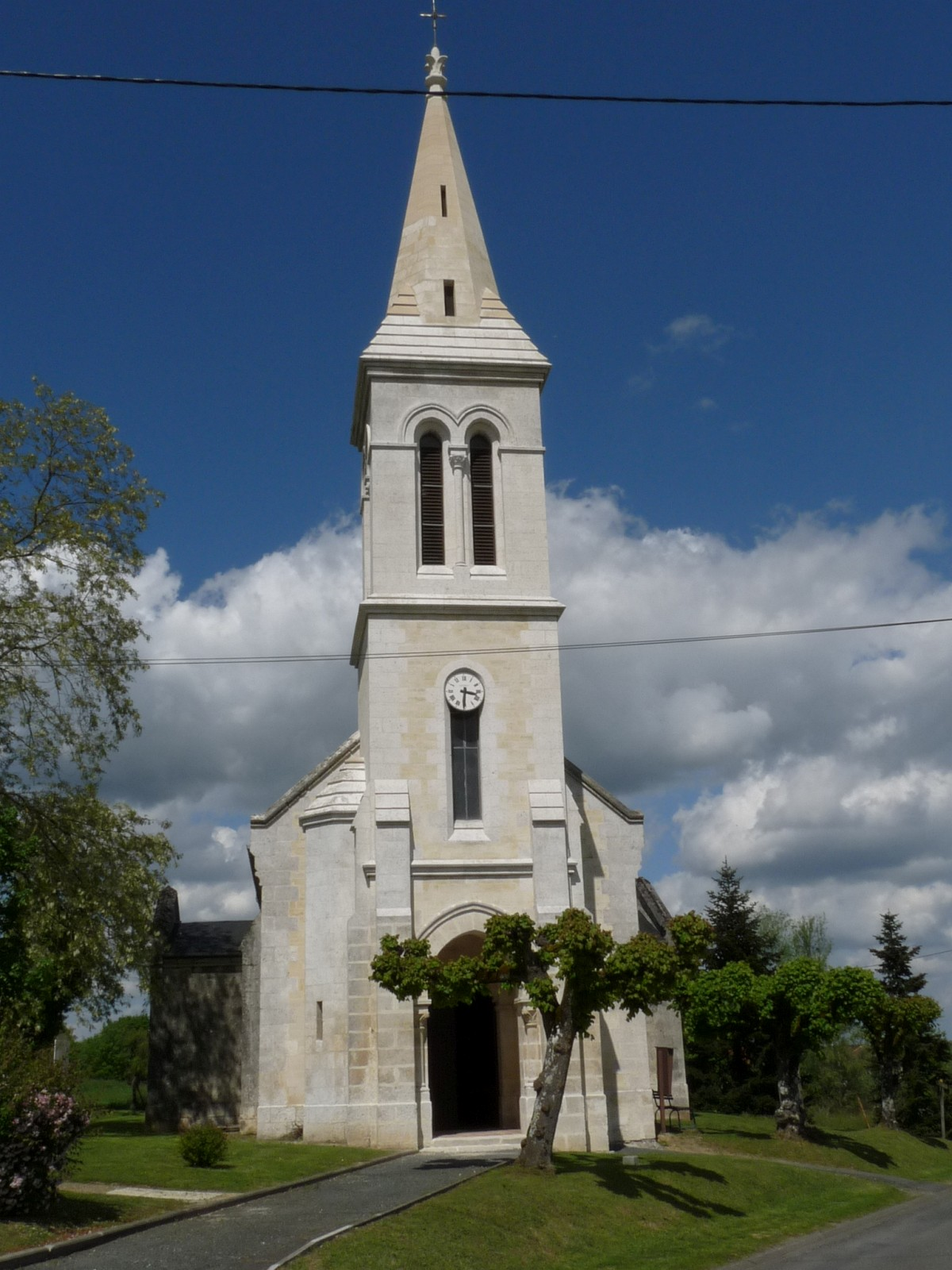 Eglise de La Barde, Charente-Maritime, France